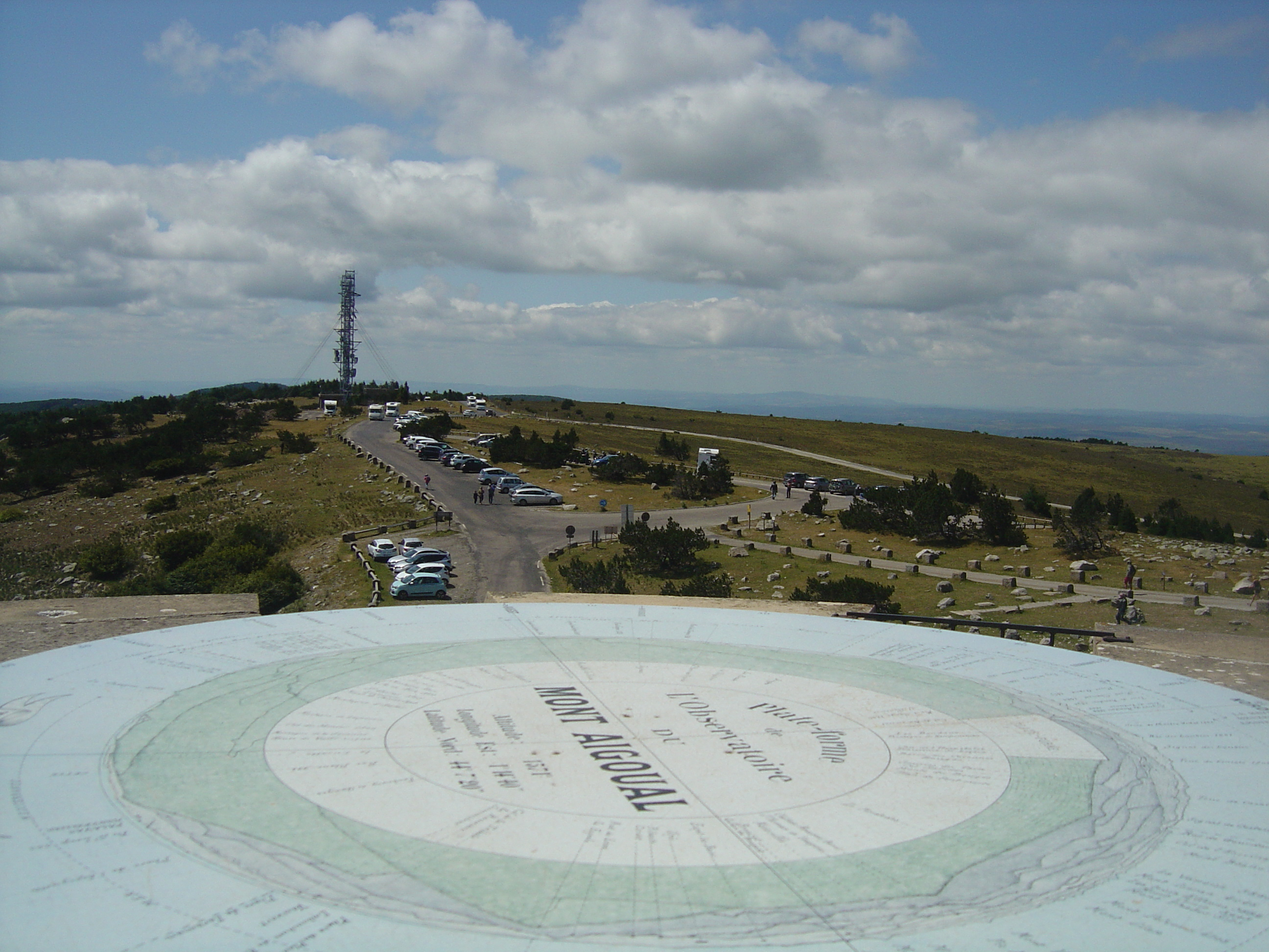 Table d'orientation du mont Aigoual (1565m)